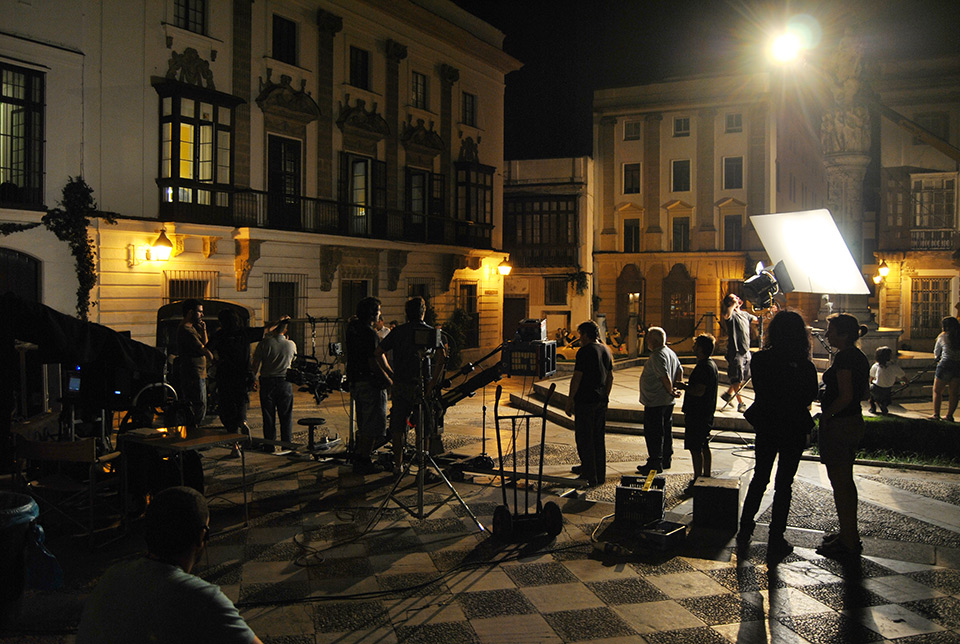 Rodaje miel Naranjas